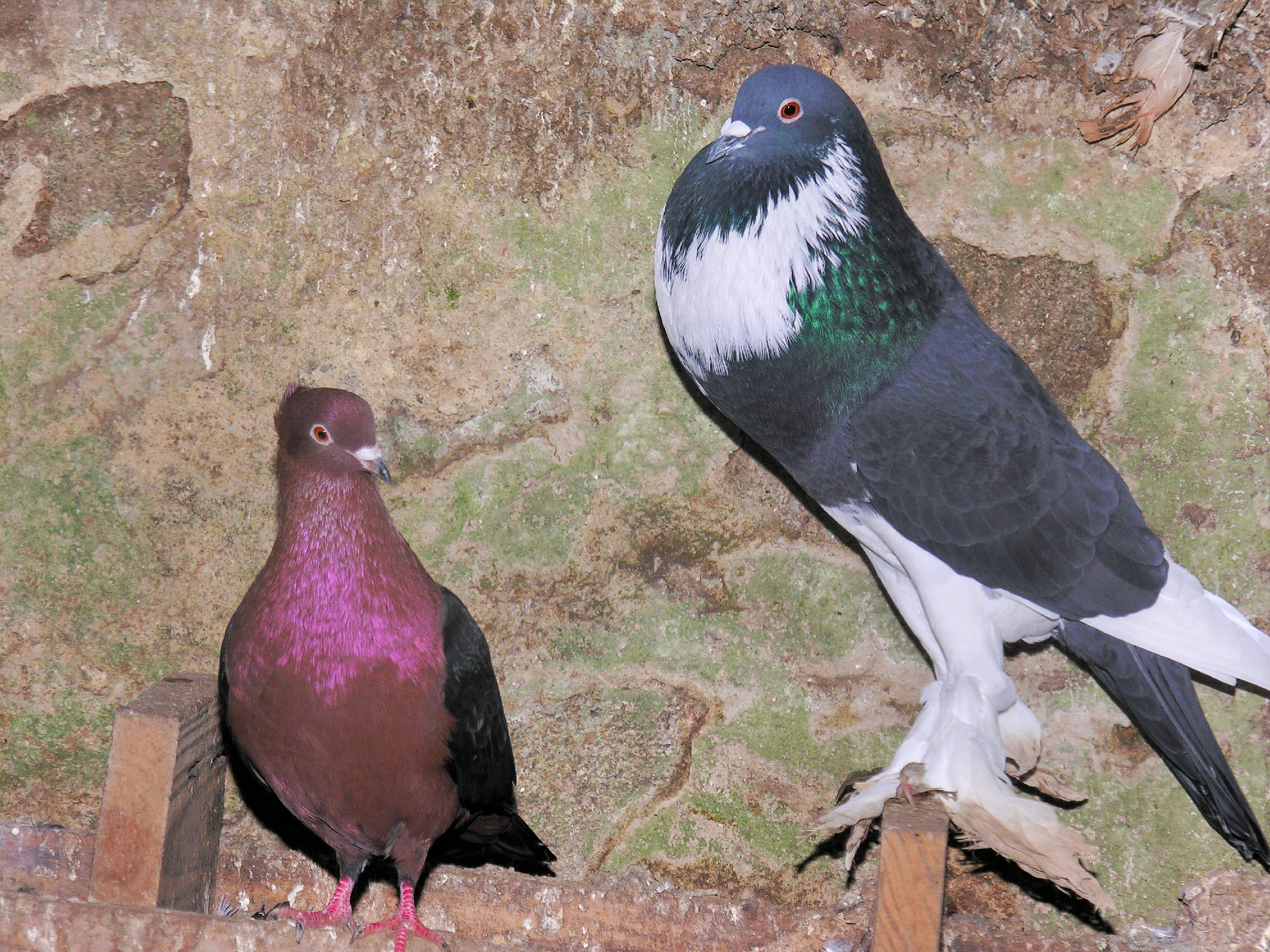 self made